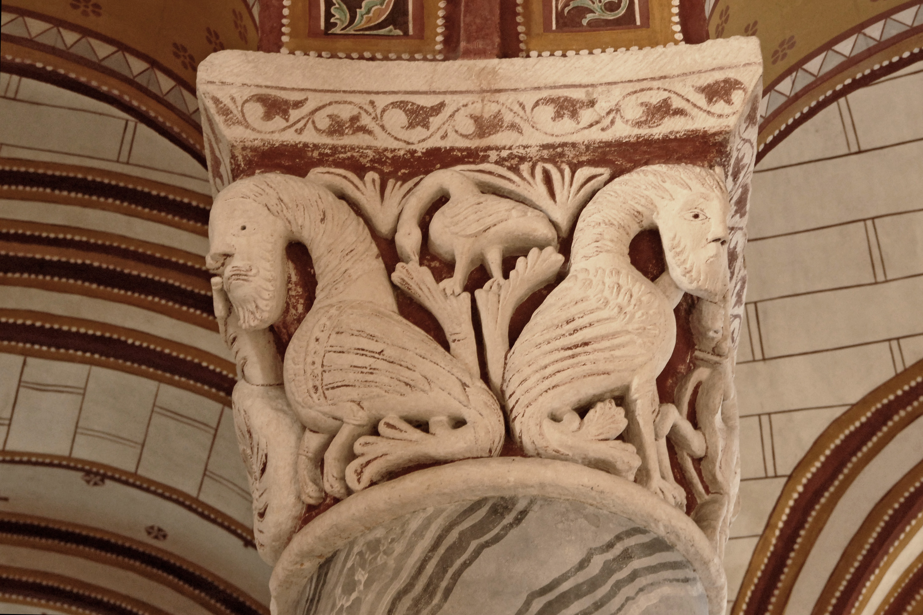 Kapitell VII